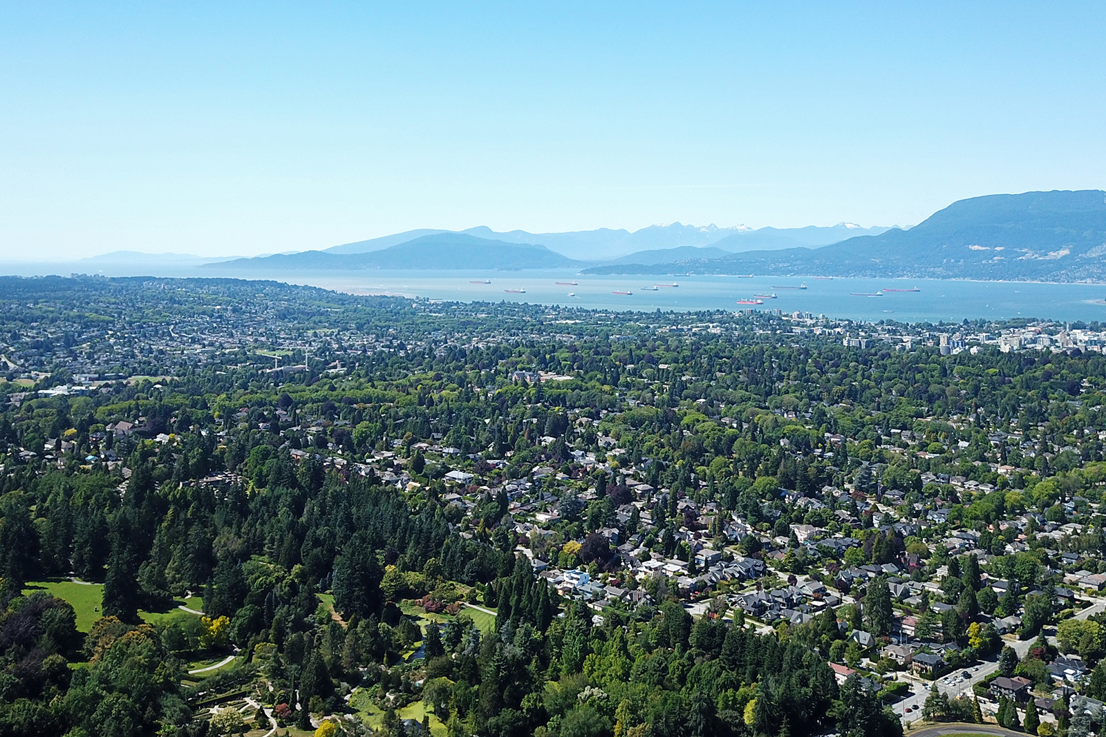 Shaughnessy